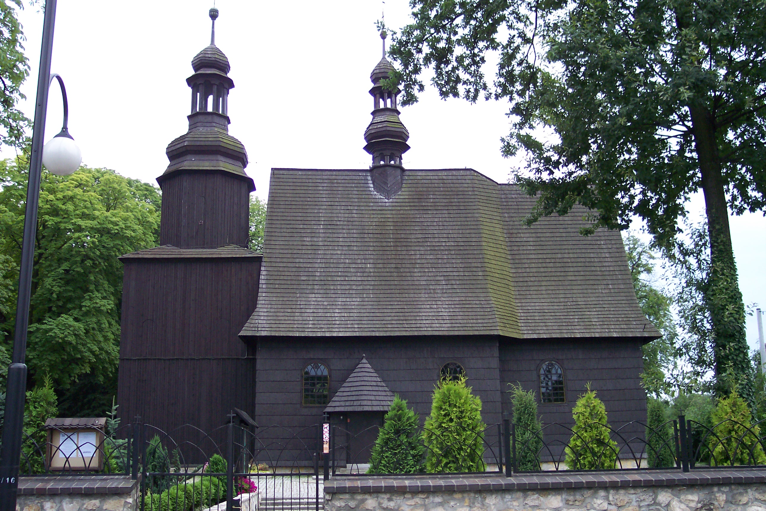 Kościół Wniebowzięcia Matki Boskiej w Gliwicach